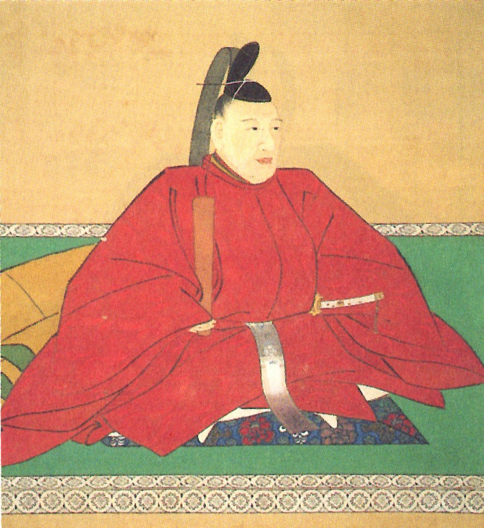 堀田正敦の肖像。